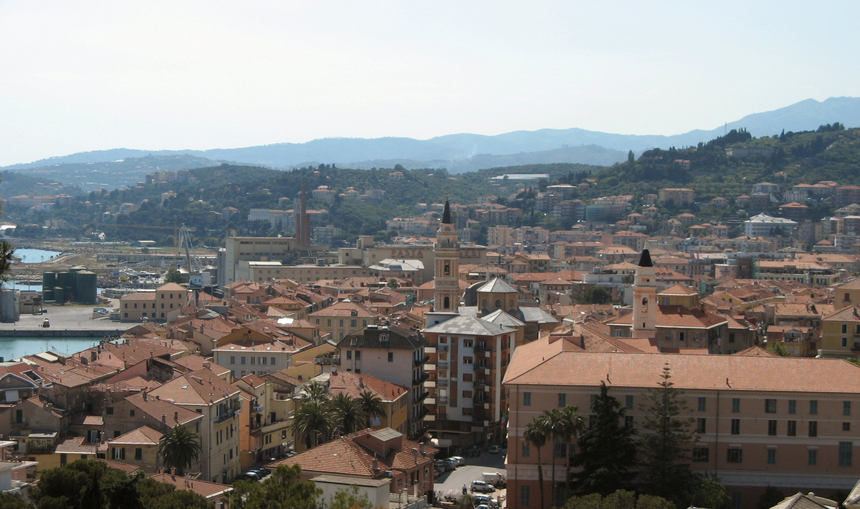 Oneglia, Imperia (Italy)